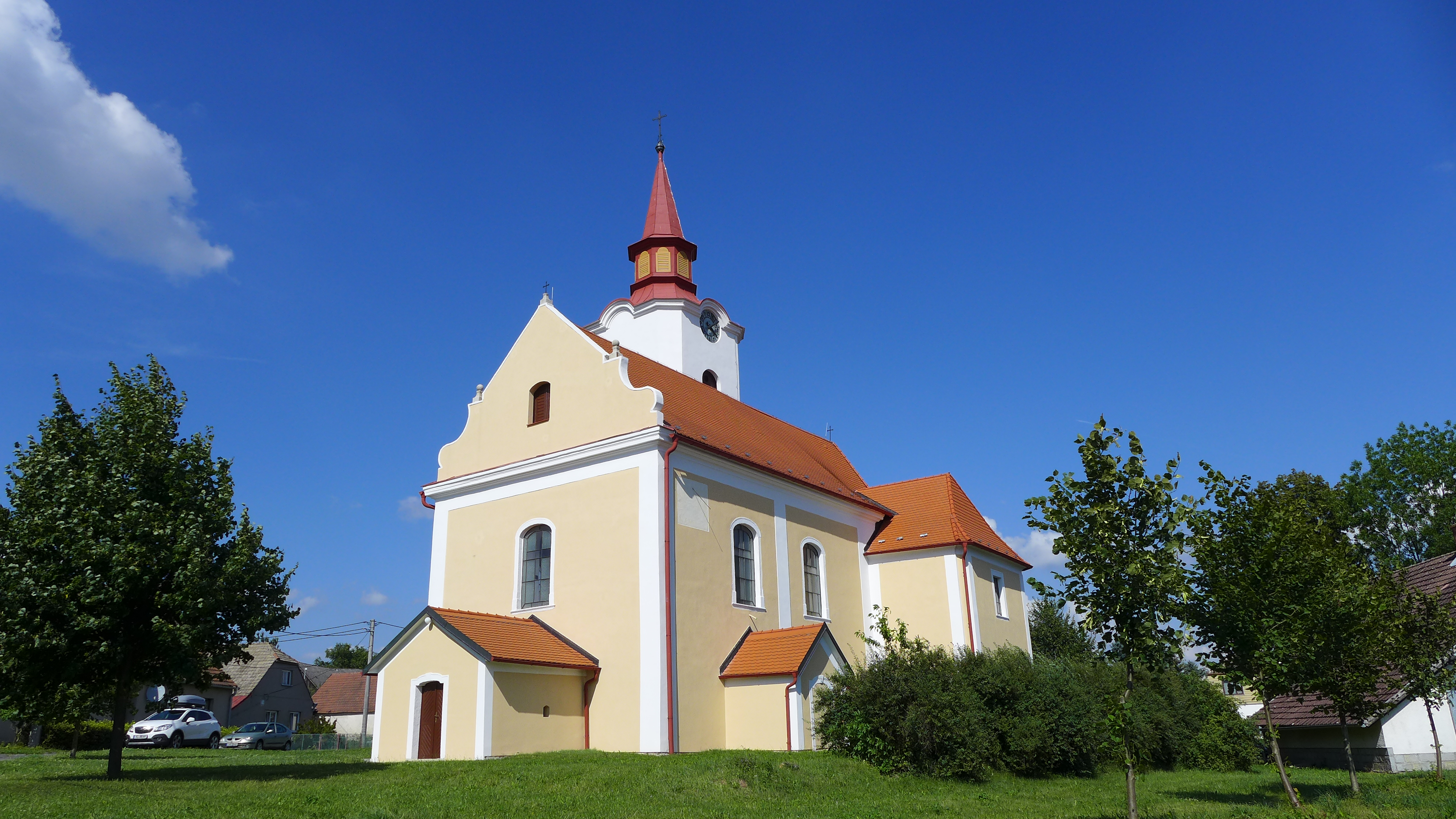 Kostel svatého Víta, náves, Pavlov (okres Jihlava).